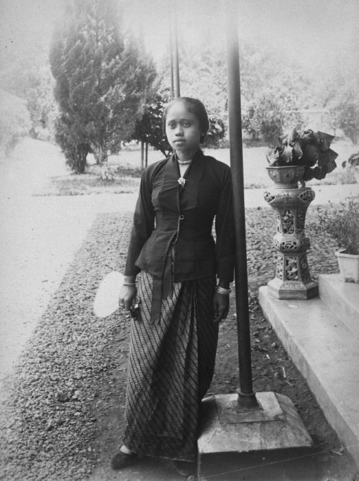 Foto. Portret van een dochter van de regent van Manondjaja